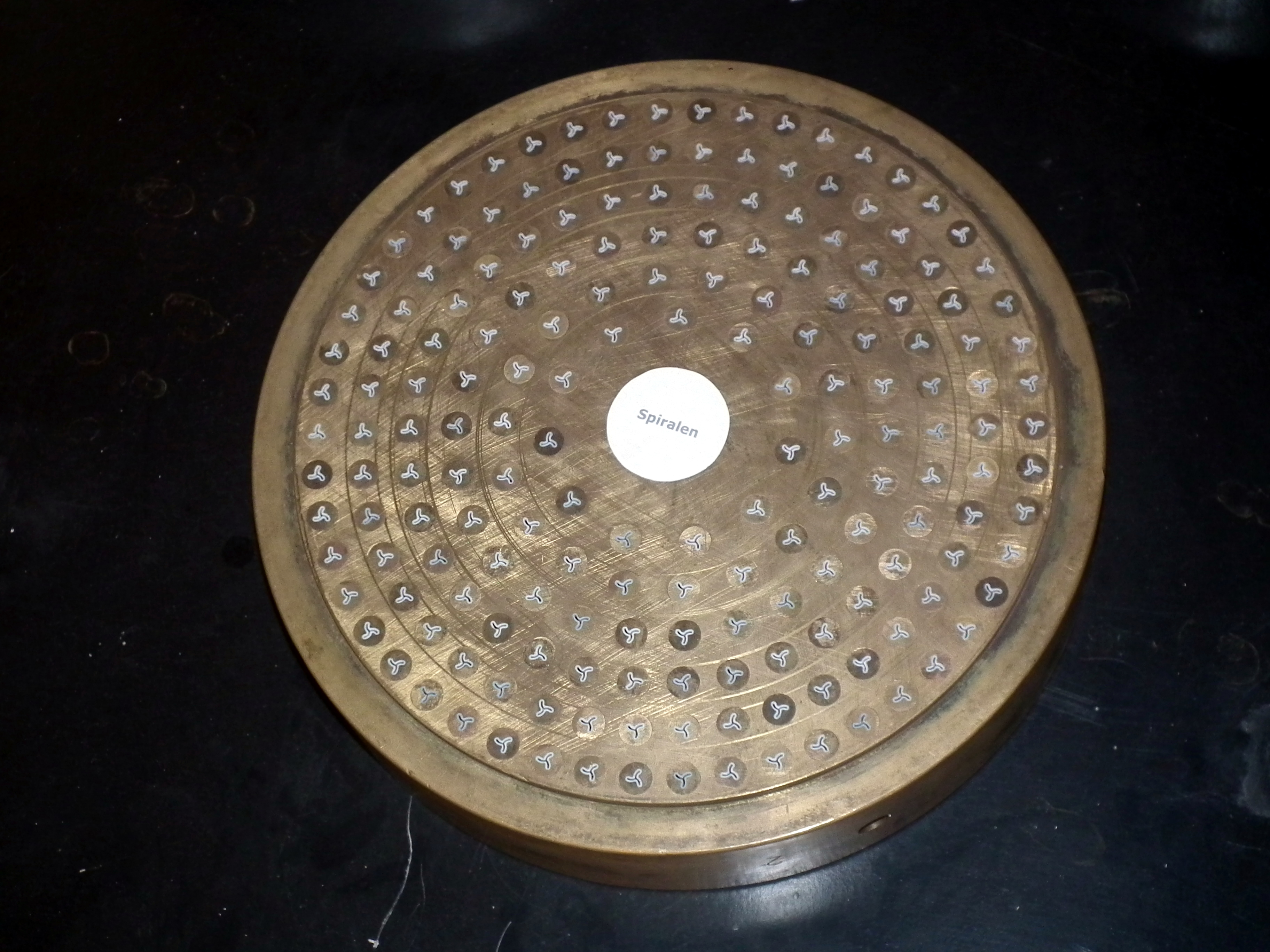 Industrielle Nudelherstellung, Nudelmatrize Spiralen, aufgenommen im Nudelmuseum Riesa